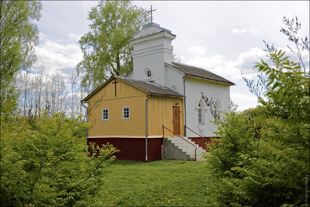 Куль. Капліца Святога Іосіфа